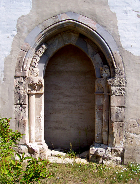 Kirche Ludwigsdorf; wiederentdecktes Südportal aus dem 13. Jahrhundert (Übergangszeit von der Romanik zur Gotik)